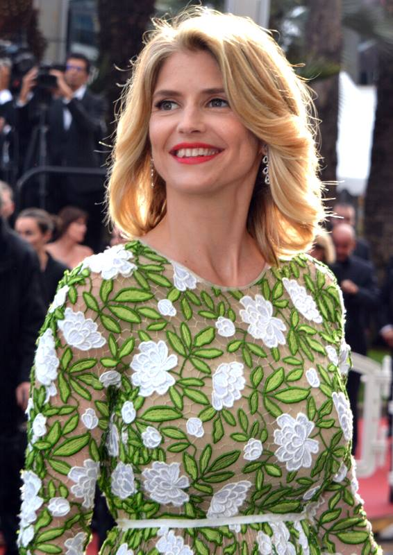 Alice Taglioni au festival de Cannes